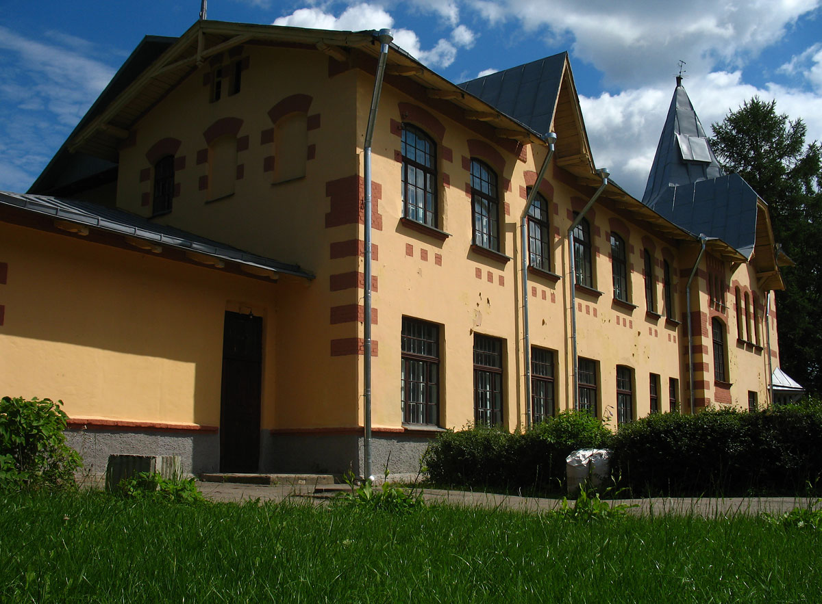 Беларуская (тарашкевіца): Лужасна